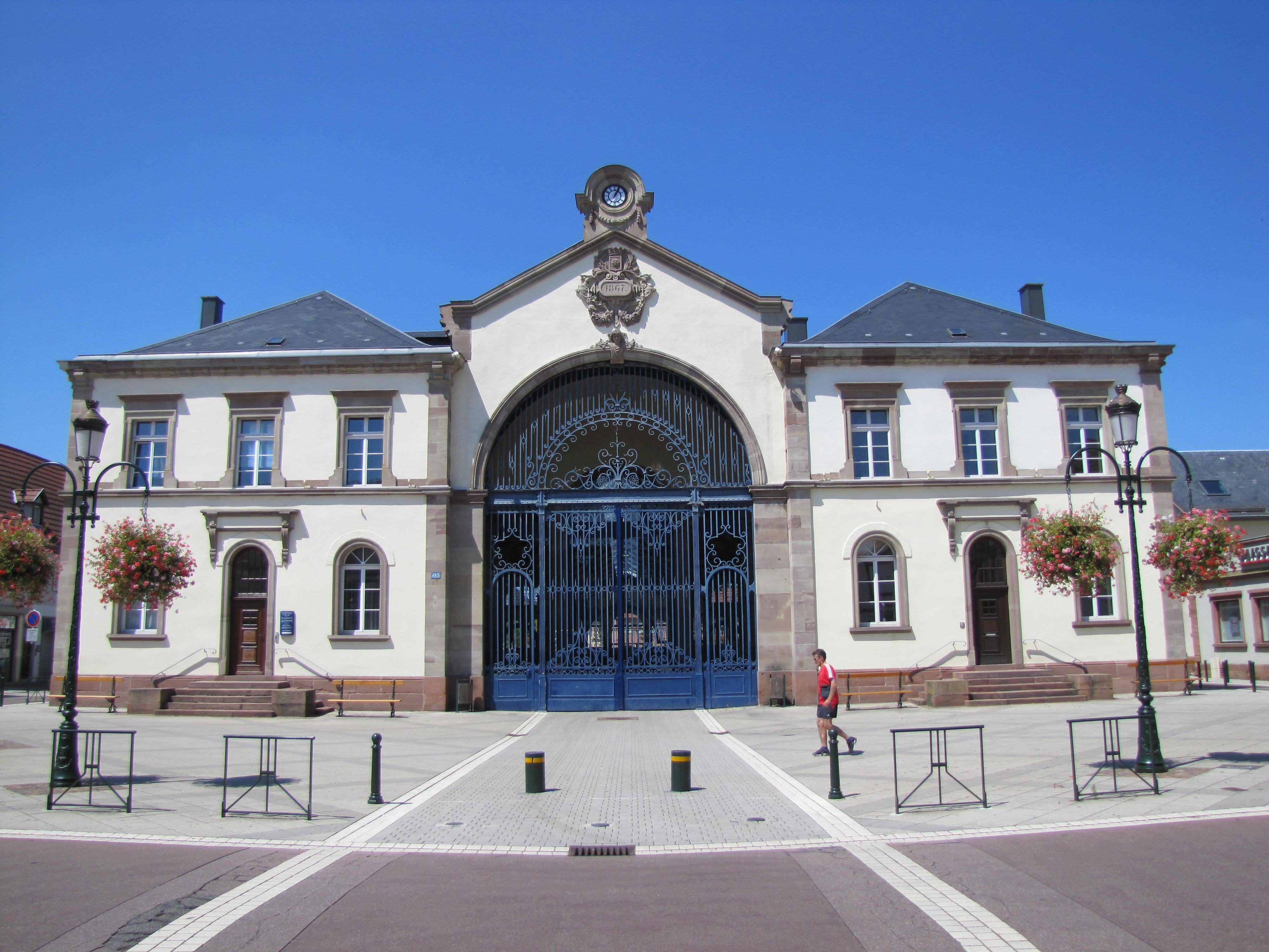 Alsace, Bas-Rhin, Haguenau, Halle aux Houblons (1867), 115 Grand'Rue (IA00062051).